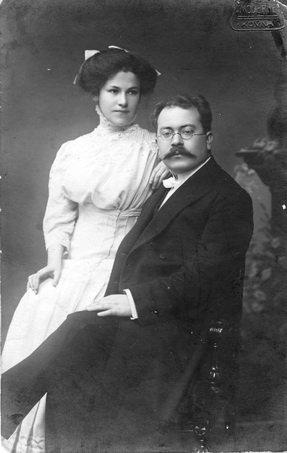 הוריו של עמנואל יפה בלהה ויצחק יפה רחובות תרעט ; 1919 - ביהס הריאלי